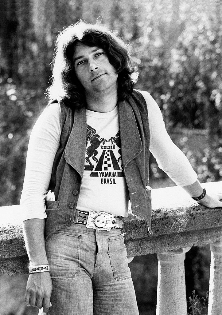 Eumir Deodato in Venice